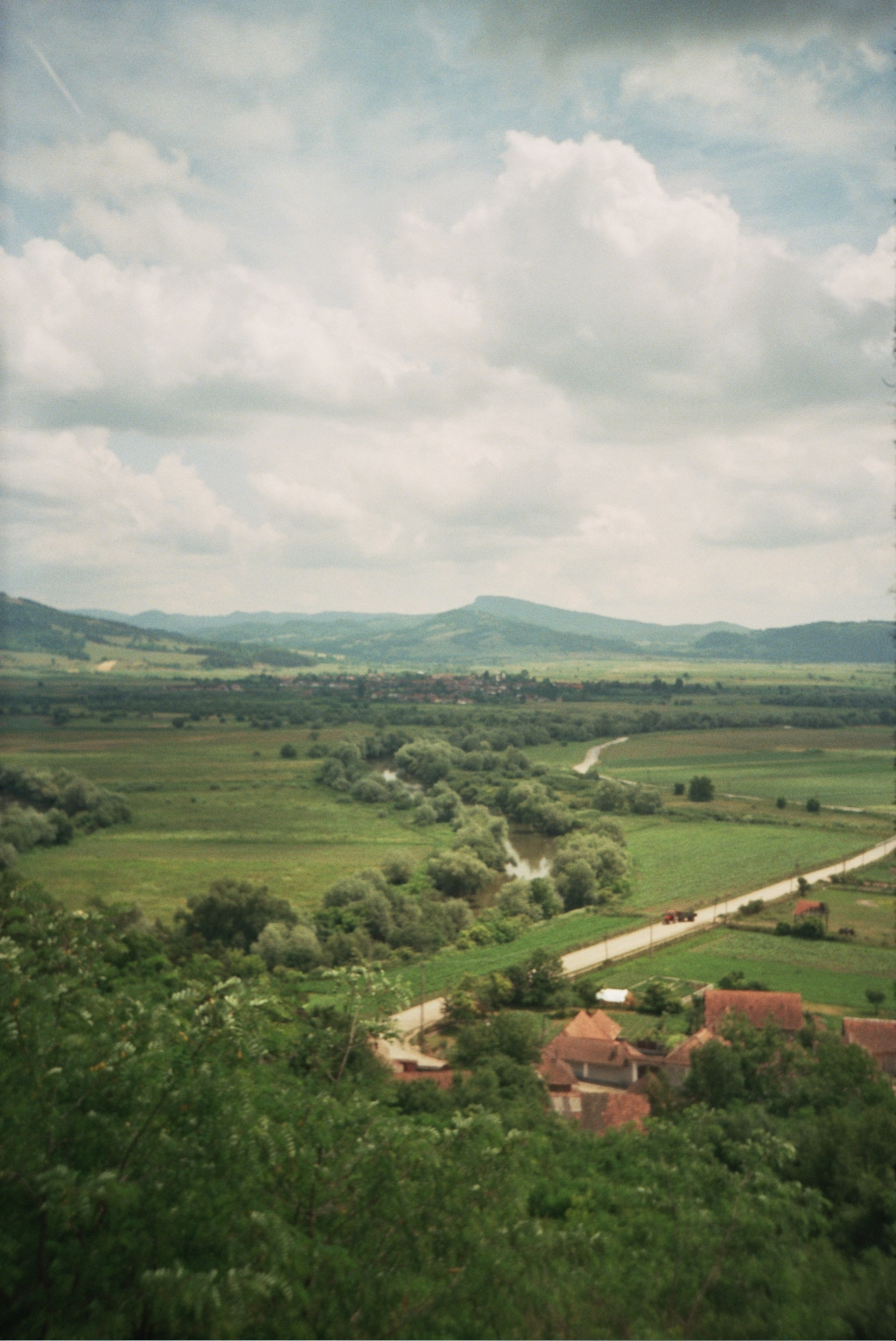 Unterkomana